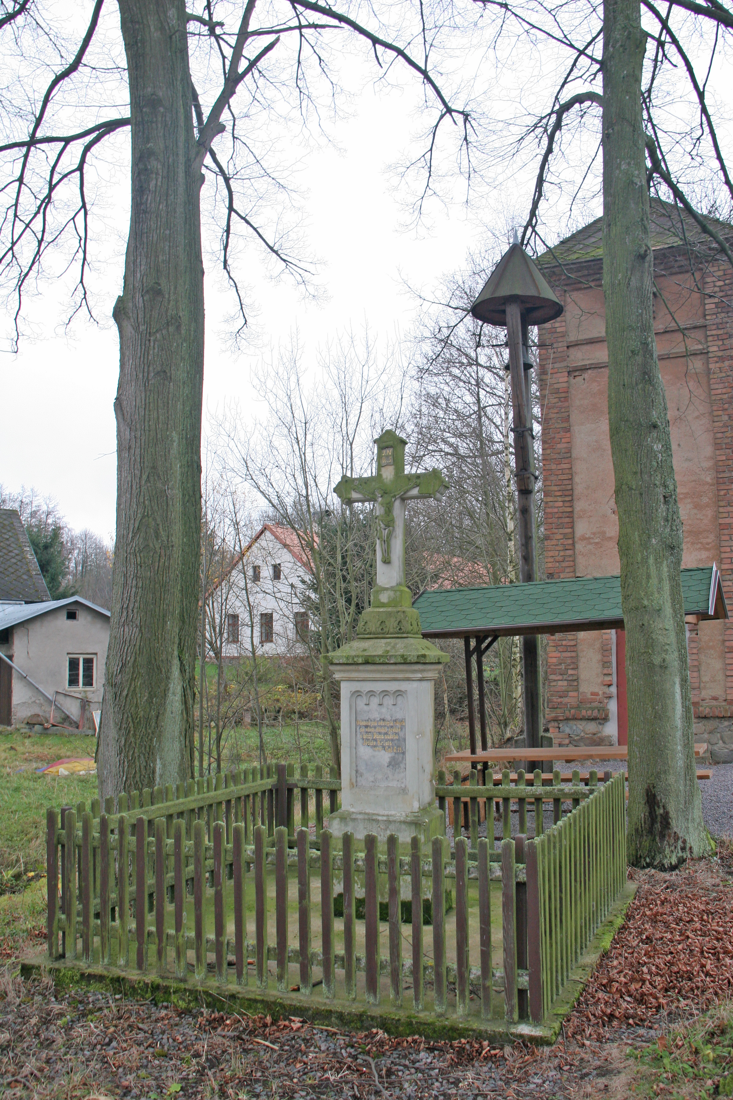 Hodonín kříž